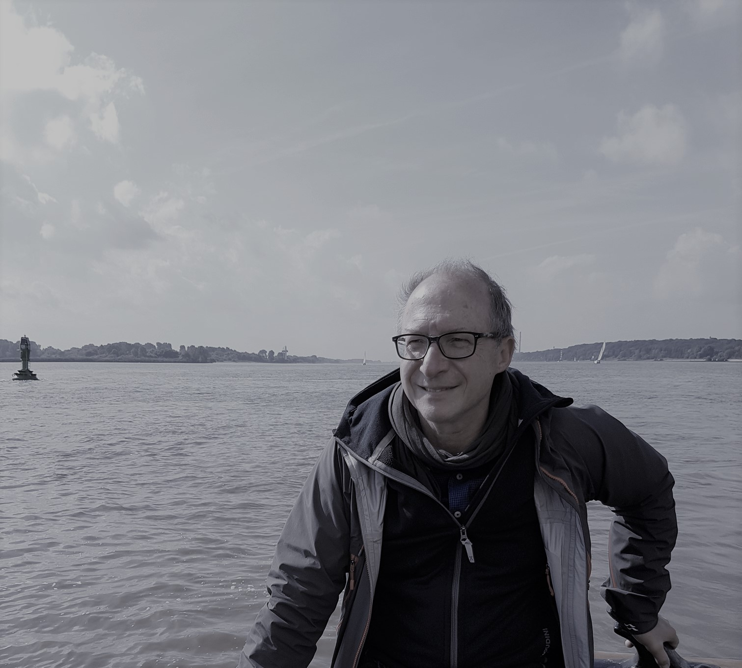 Matthias Oppermann bei einer Bootsfahrt auf der Elbe.